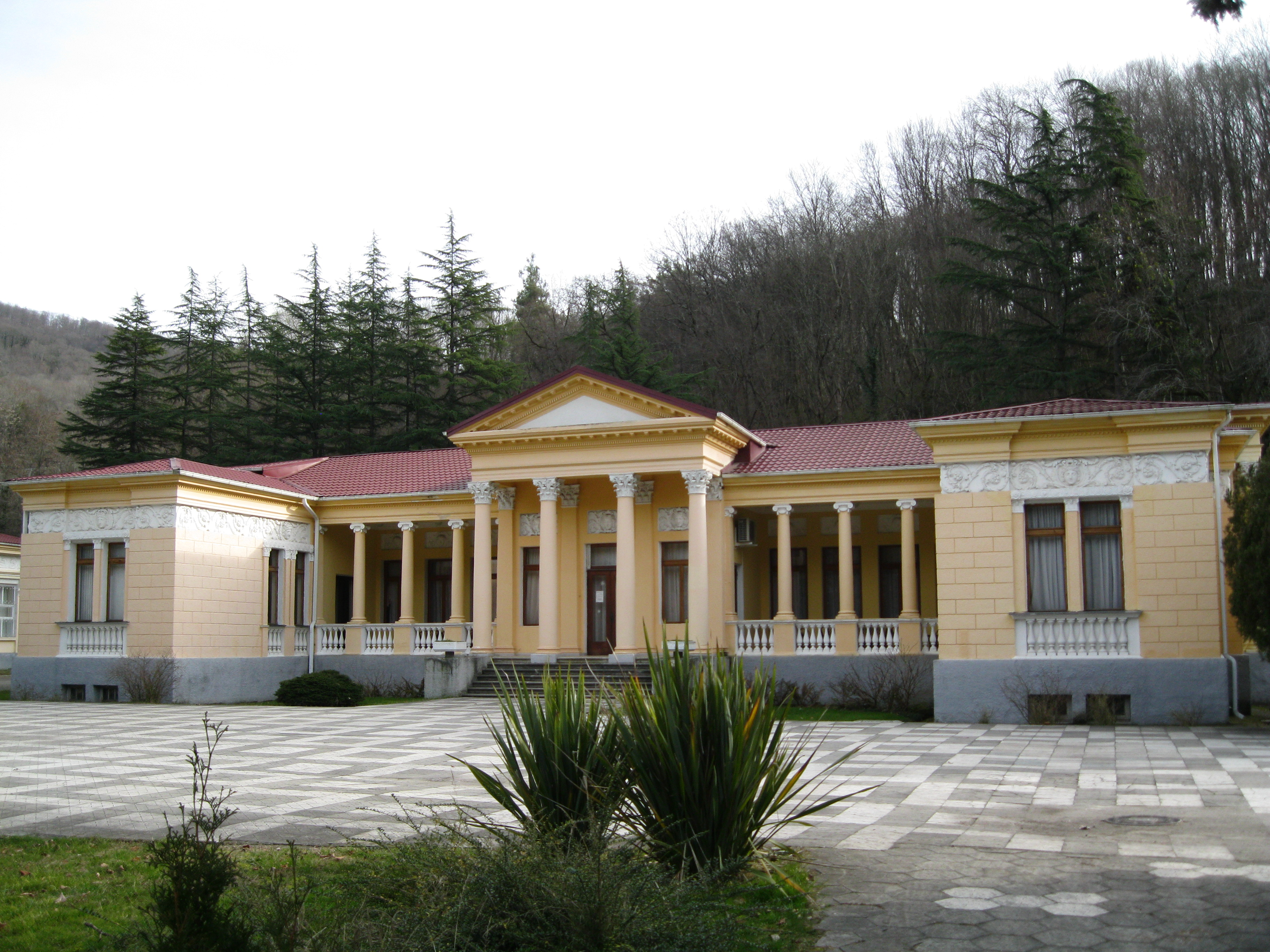 Амбулаторно-поликлиническое отделение Мацестинского бальнеологического комплекса в Сочи, Россия